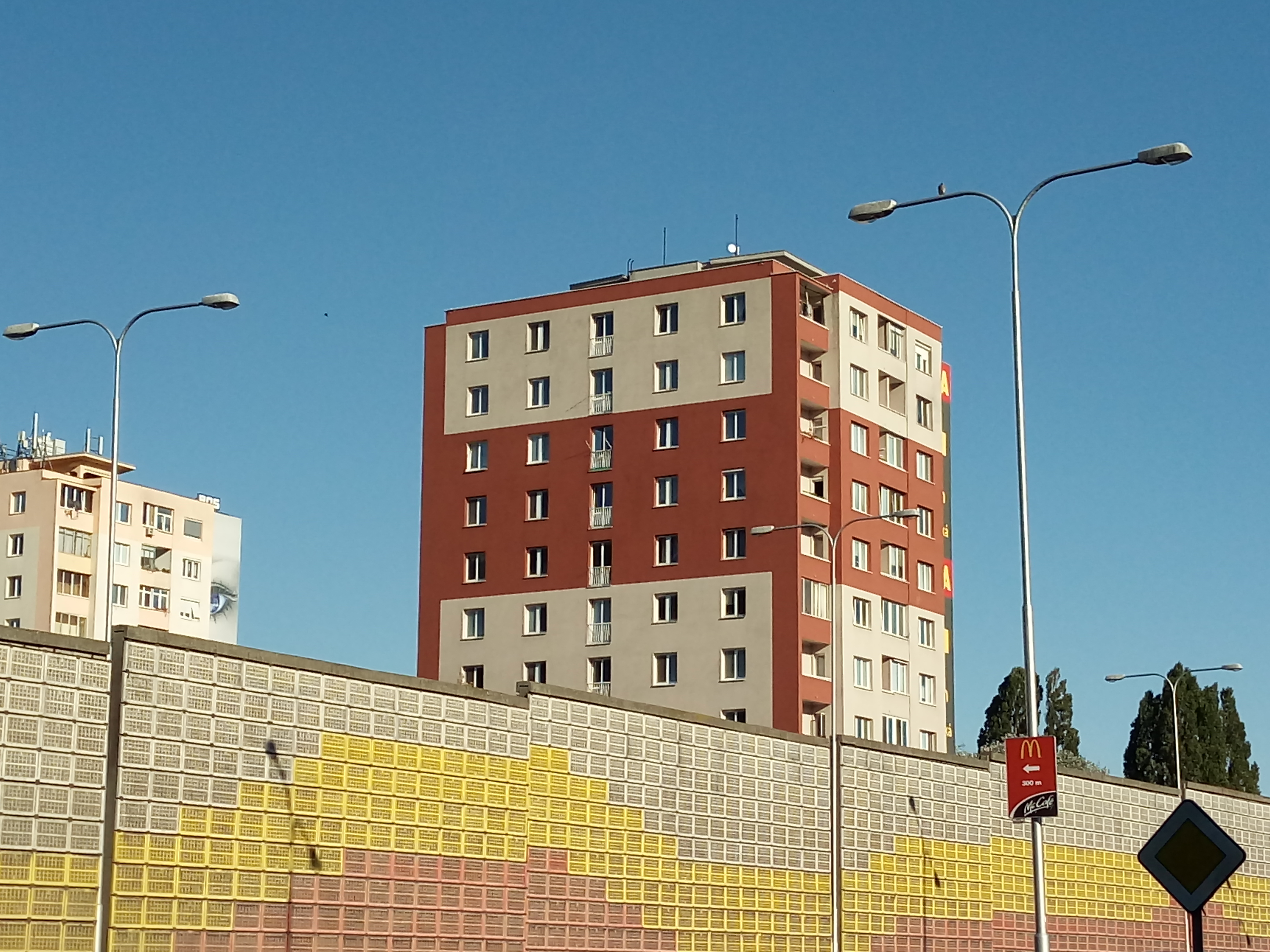 Martinčekova 30, Ružinov, Bratislava